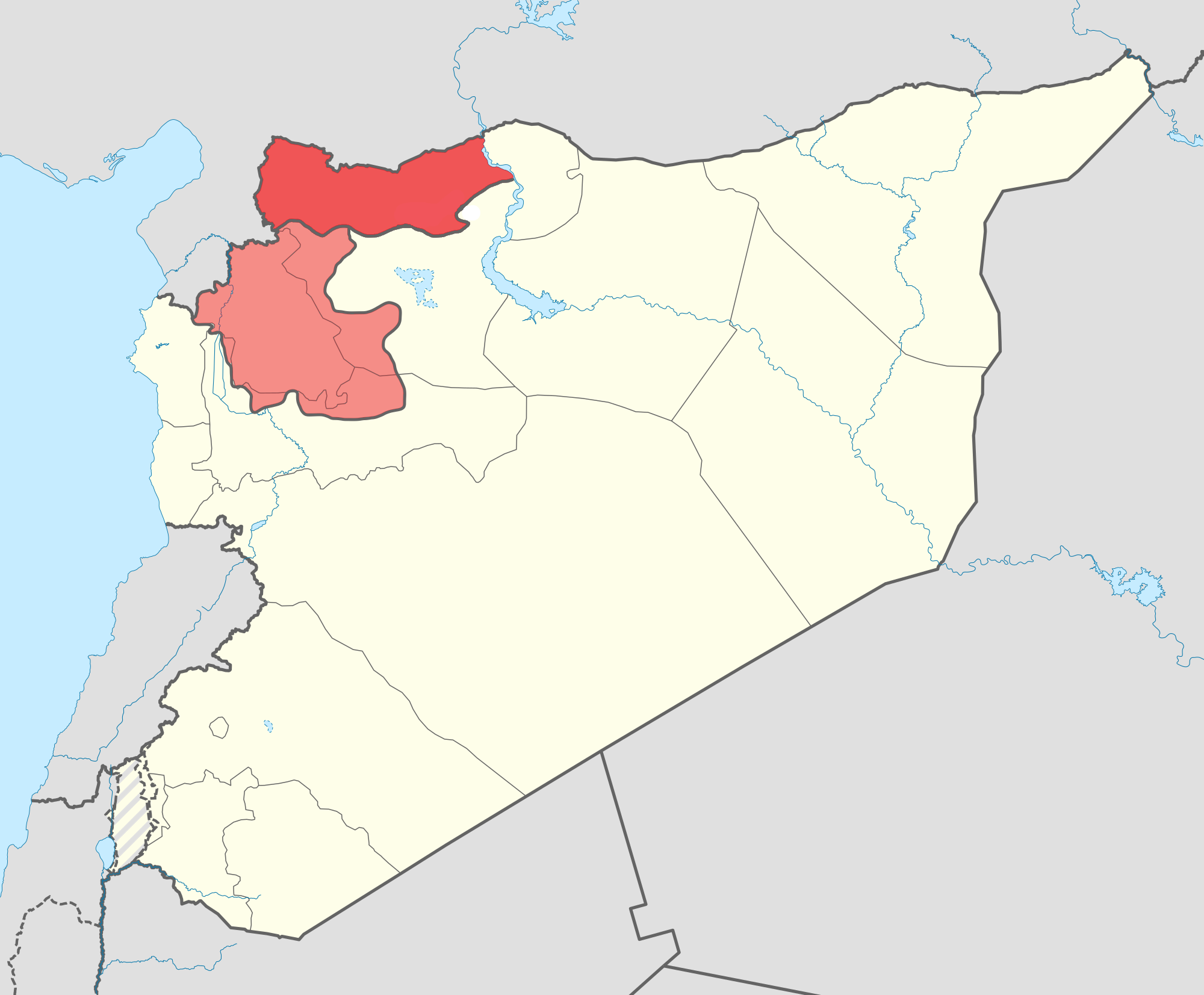 Türkische Besetzung Nordsyrien